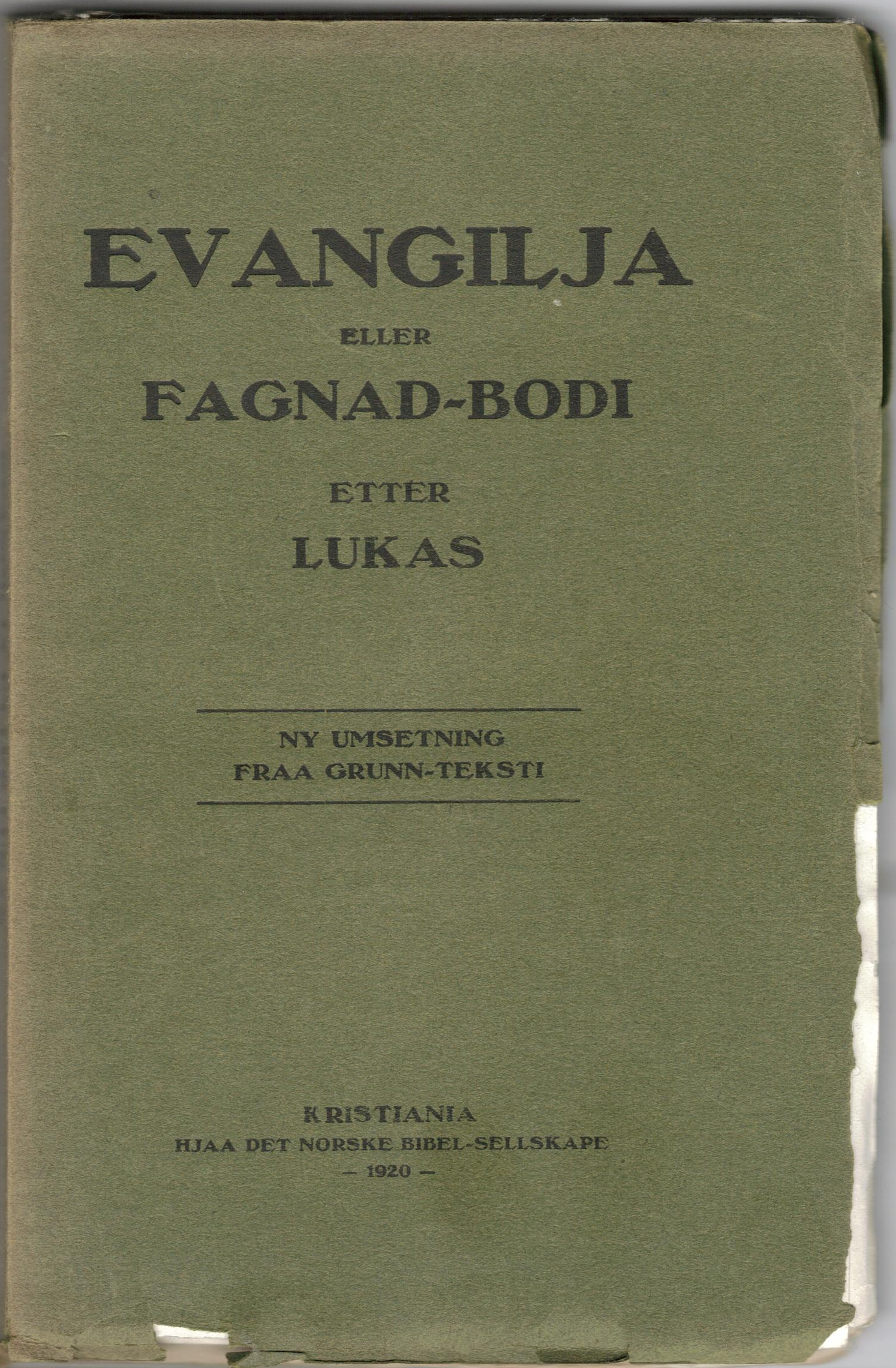 Omslagsframsida på Evangilja eller Fagnad-bodi etter Lukas frå 1920. Ny umsetjing fraa grunn-teksti. Kristiania Hjaa Det norske bibel-sellskape 1920. Omsetjinga er ved Alexander Seippel, men namnet hans står ingenstad nemd i heftet.